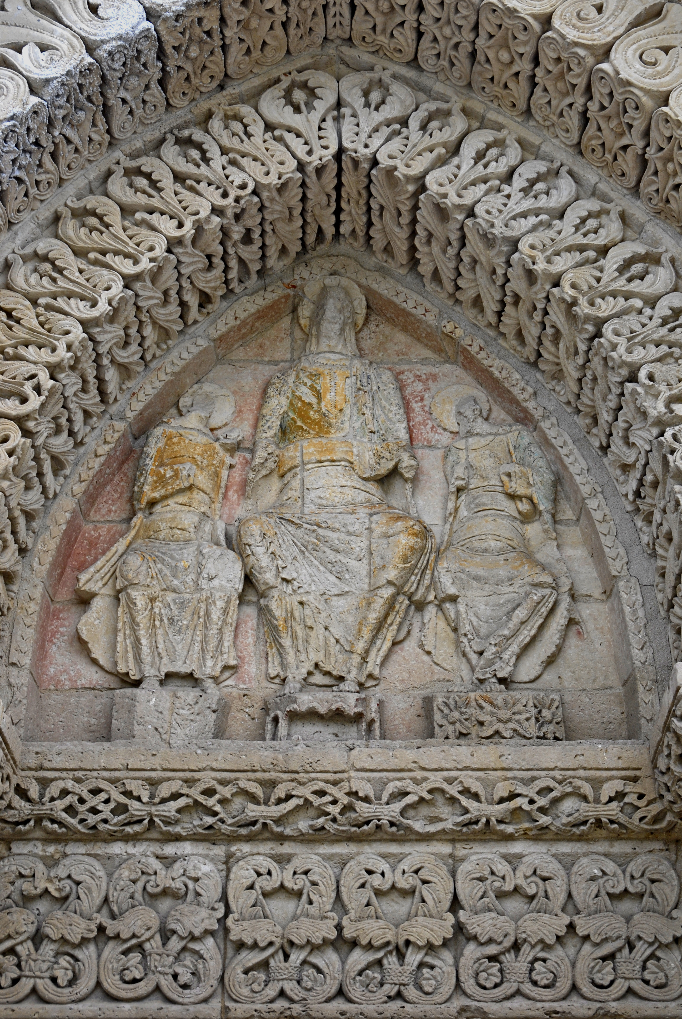 St.-Pierre Aulnay, Tympanon rechtes Scheinportal